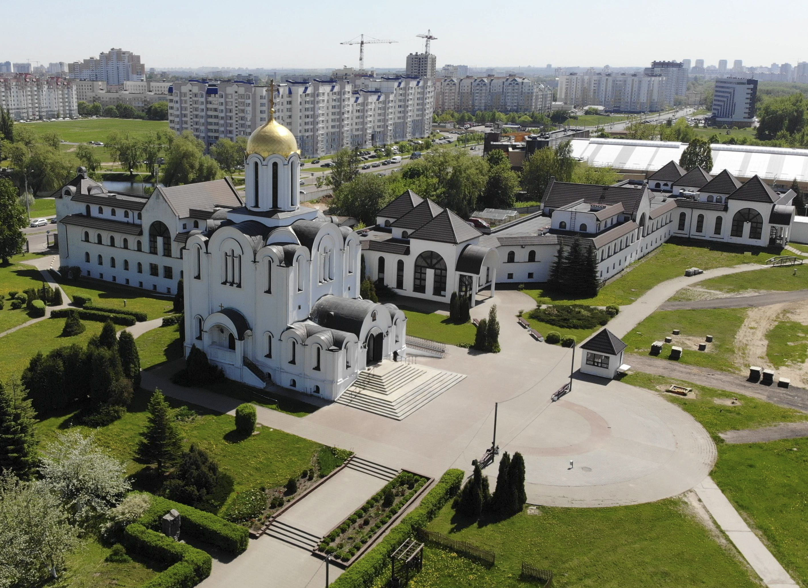 Учебный корпус (включает здания Социальных мастерских, воскресной школы, трапезную)